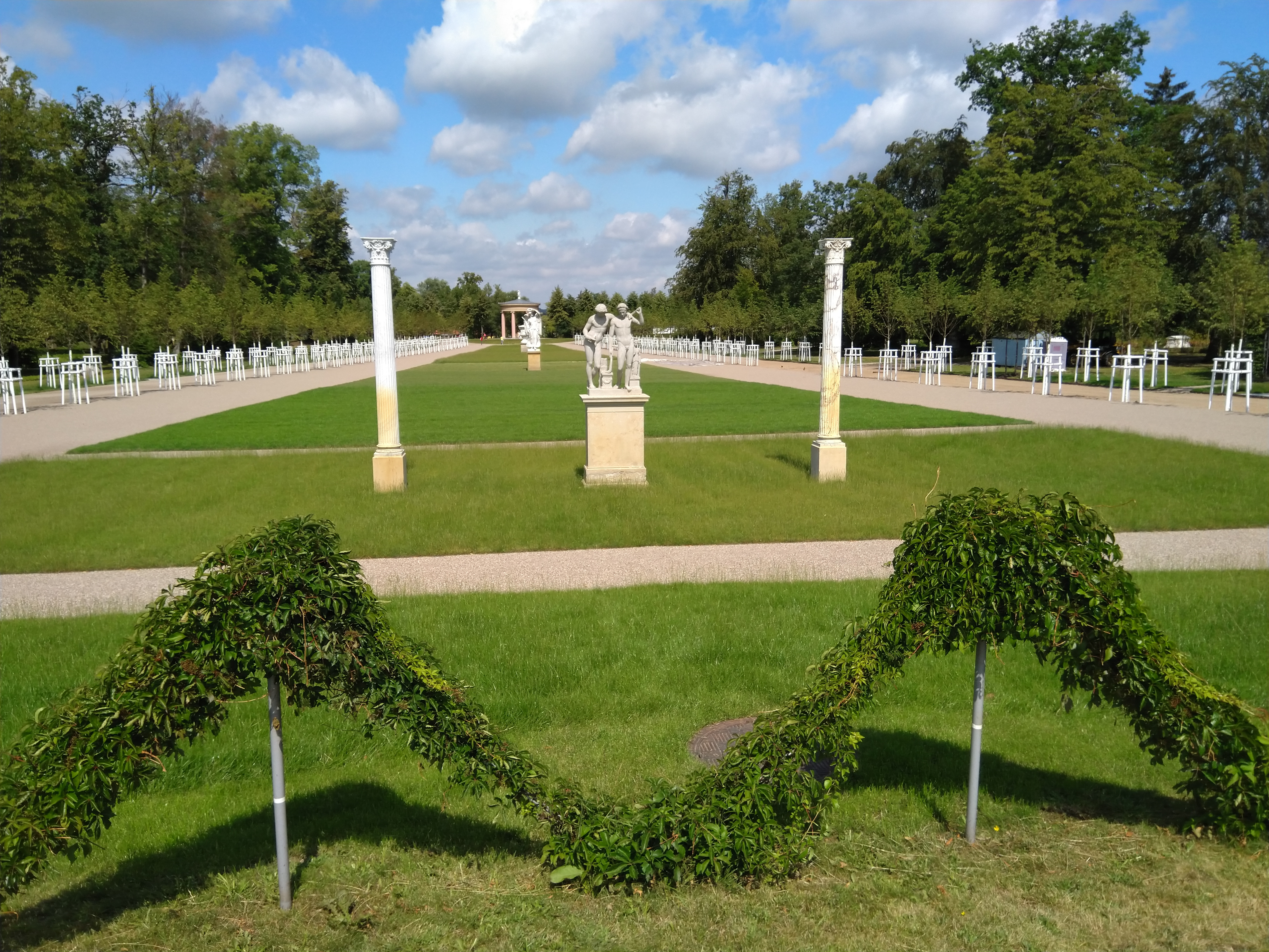 Parterre der barocke Hauptachse im Schlosspark Neustrelitz